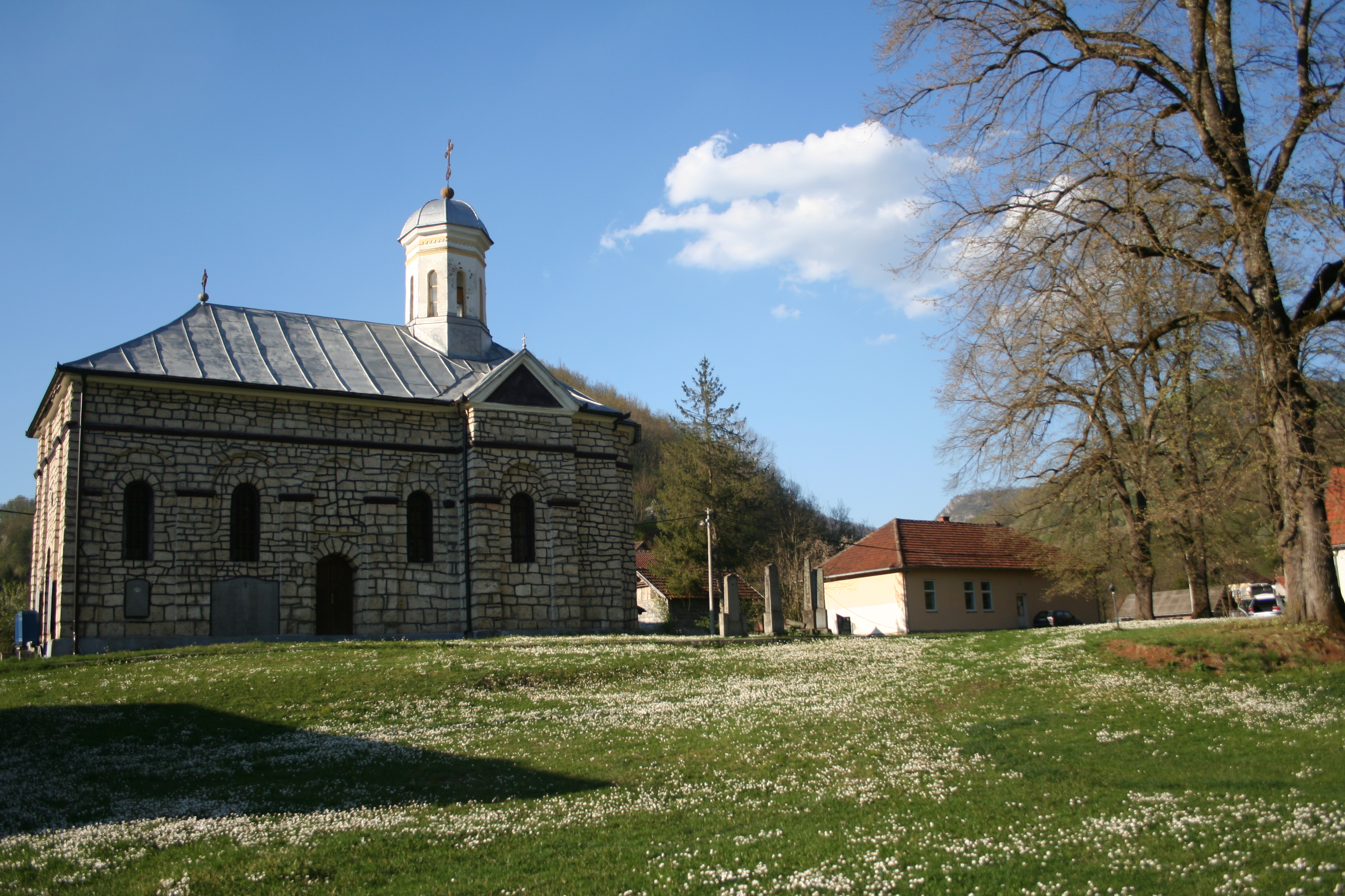 Crkva Vaznesenja Gospodnjeg, Gračanica